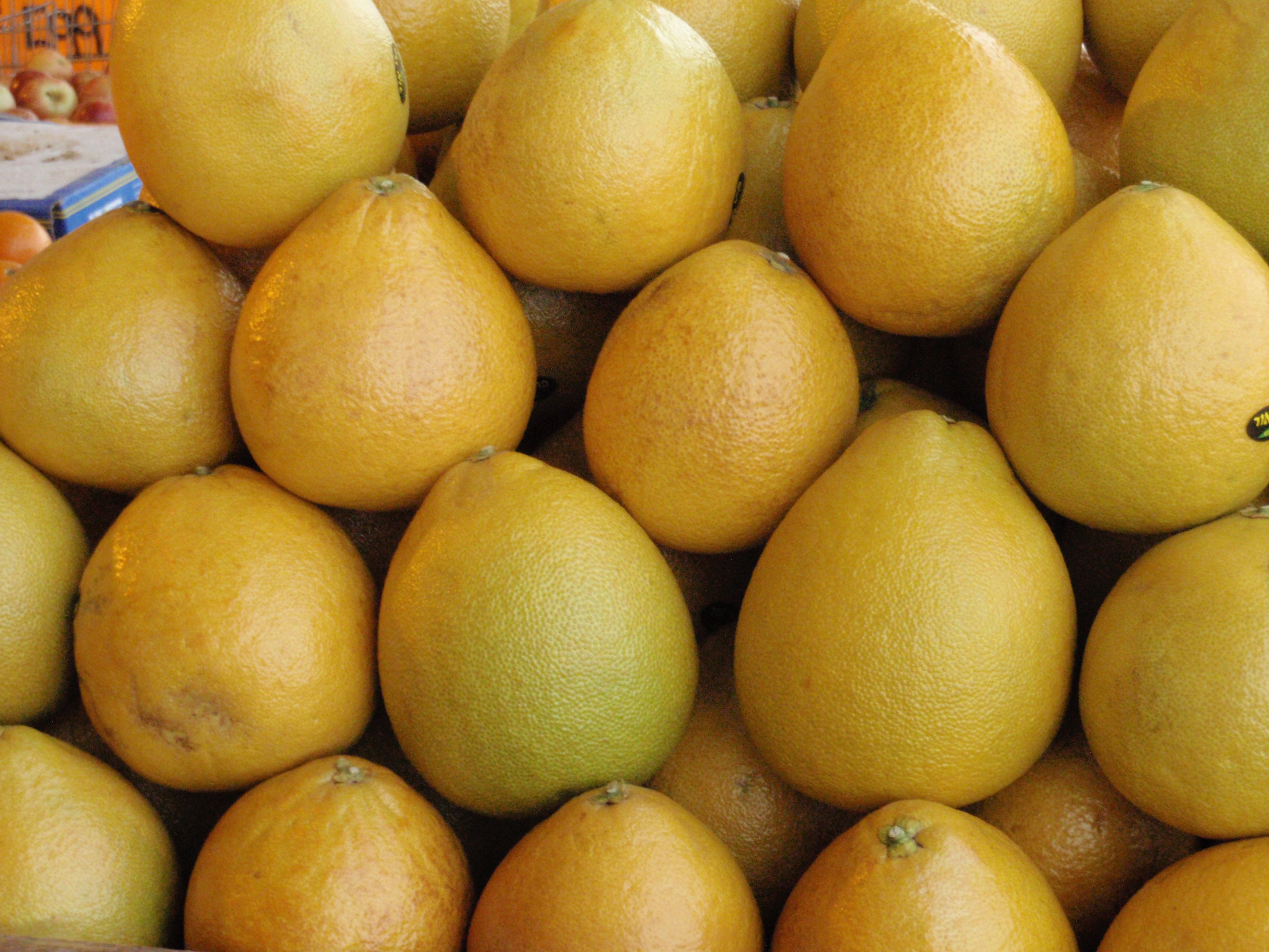 Shuk Hsayarim ירקות בשוק הסיירים